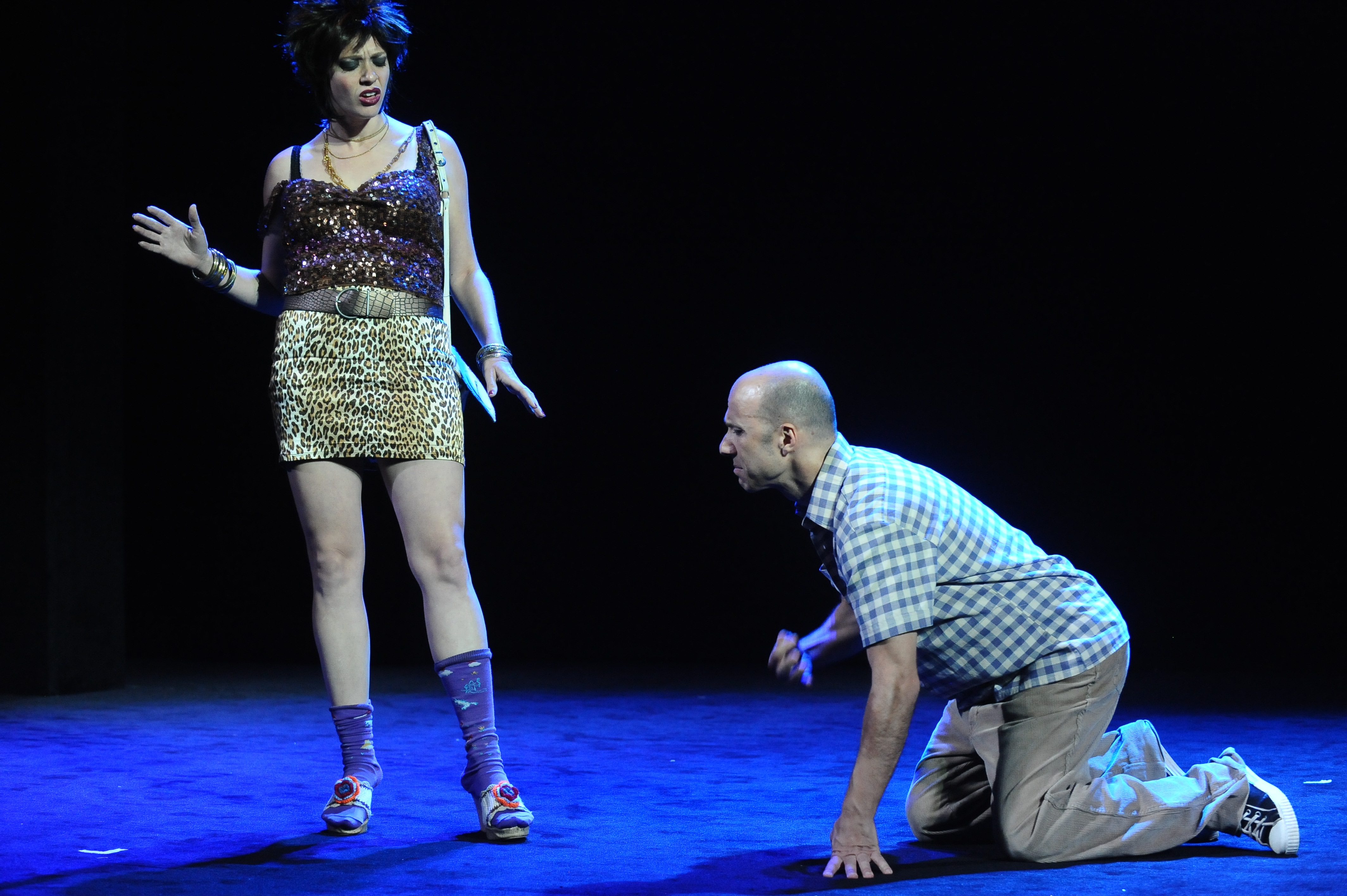 שירי גדני בהצגה אורזי מזוודות